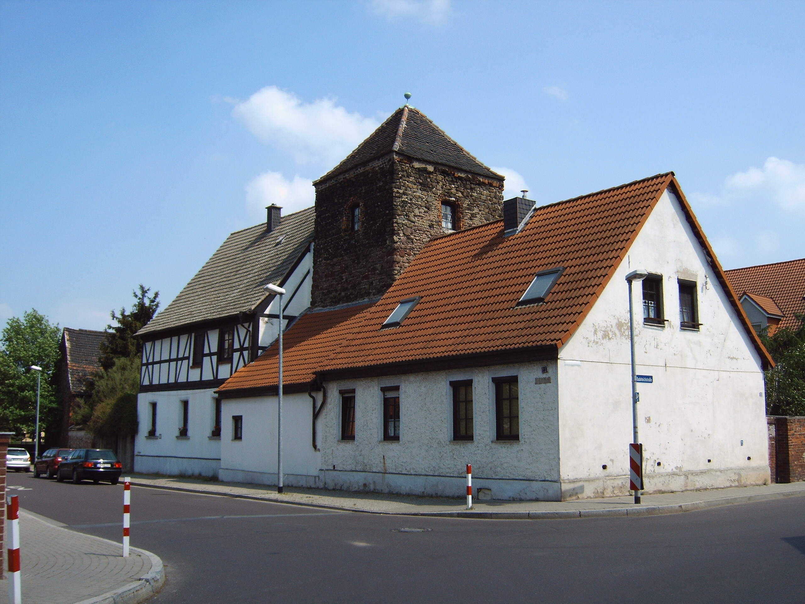 Turmhaus Rothensee, Magdeburg, Sachsen-Anhalt